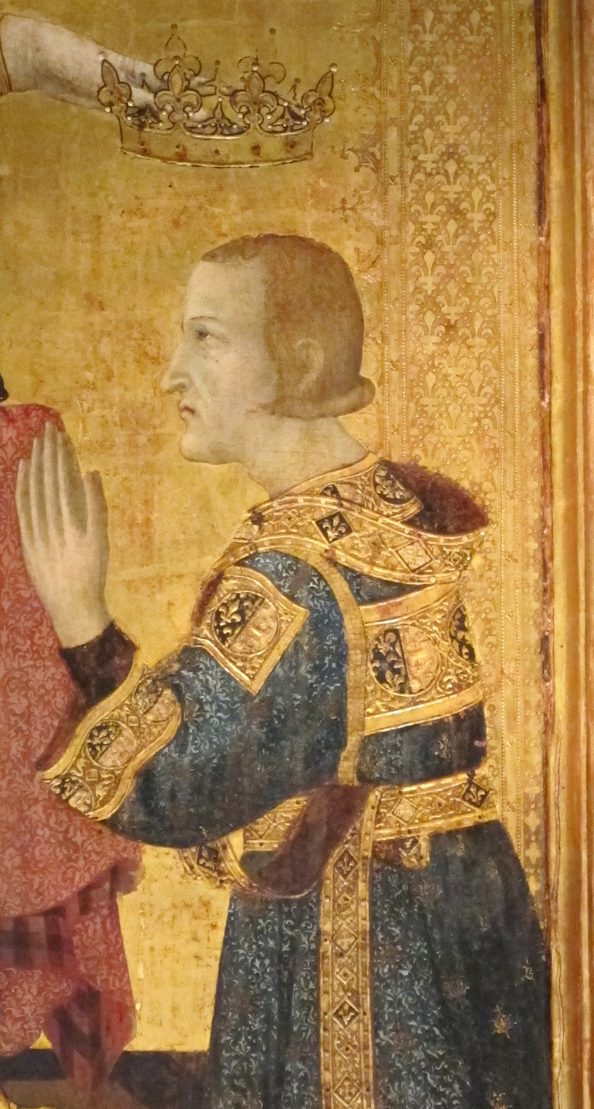 Robert Neapolský